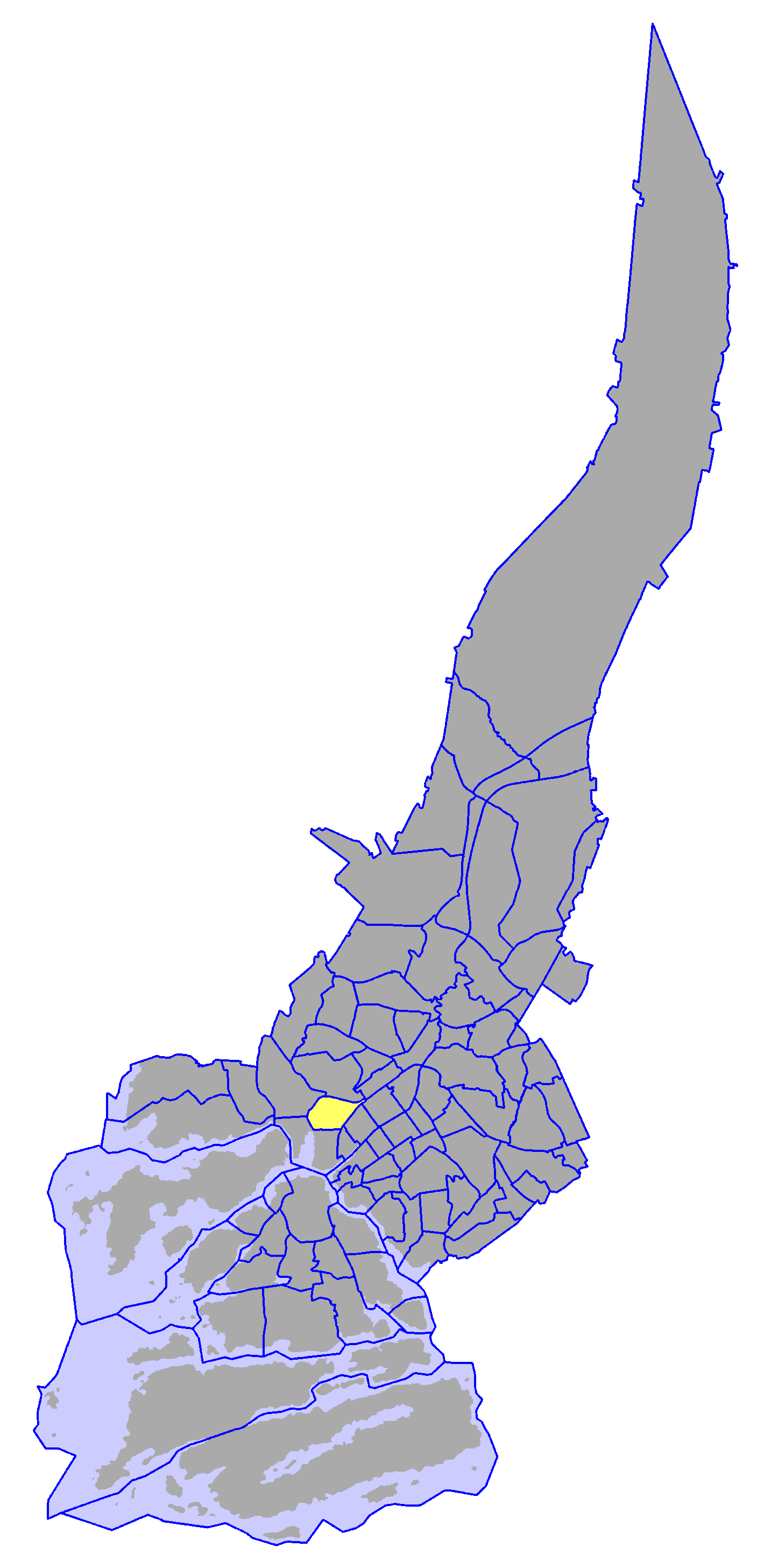 District of Iso-Heikkilä, in Turku